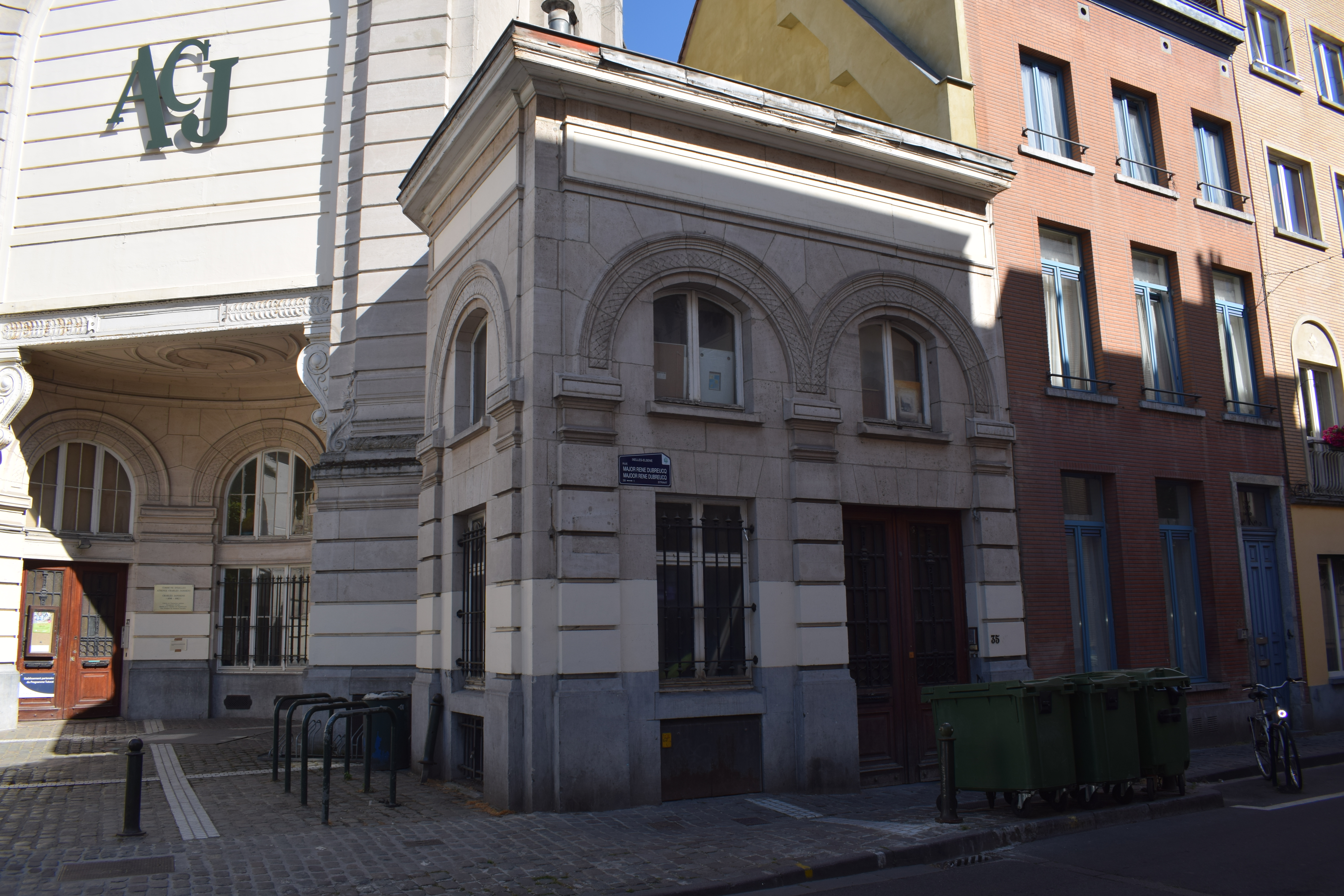 Athénée Charles Janssens entrée 28